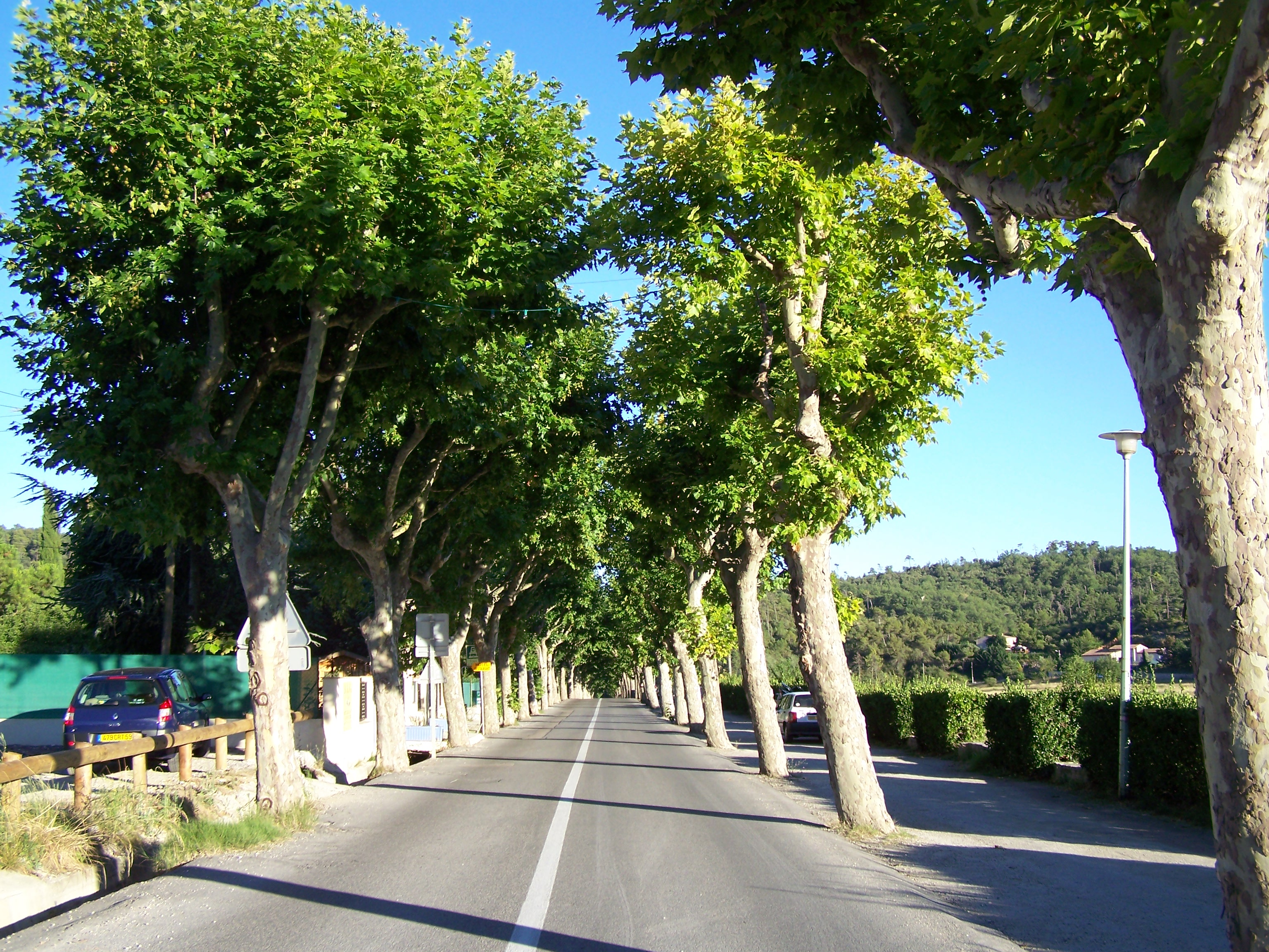 Départementale n°19 aux "grands prés" de Levens (Alpes-Maritimes, France) avec la double rangée centenaire de platanes.